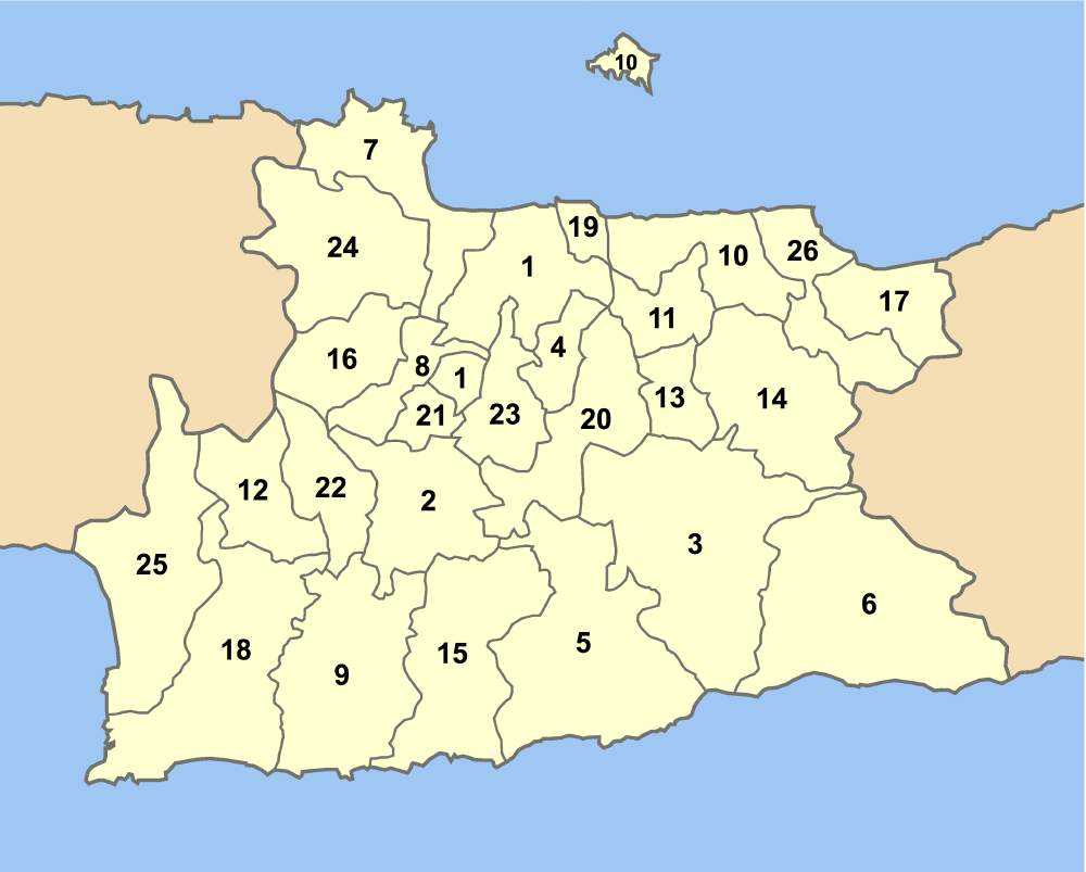 Map of Iraklio prefecture (Greece) with administrative divisions (municipalities and communities) numbered in alphabetical order (in greek). Legend: 1. Δήμος Ηρακλείου - Iraklio 2. Δήμος Αγίας Βαρβάρας - Agia Varvara 3. Δήμος ΑρκαλοχωρίουArkalochori 4. Δήμος Αρχανών - Archanes 5. Δήμος Αστερουσίων - Asterousia 6. Δήμος Βιάννου - Viannos 7. Δήμος Γαζίου - Gazi 8. Δήμος Γοργολαΐνη - Gorgolainis 9. Δήμος Γόρτυνας - Gortyna 10. Δήμος Γουβών - Gouves 11. Δήμος Επισκοπής - Episkopi 12. Δήμος Ζαρού - Zaros 13. Δήμος Θραψανού - Thrapsano 14. Δήμος Καστελλίου - Kasteli 15. Δήμος Κόφινα - Kofinas 16. Δήμος Κρουσώνα - Krousonas 17. Δήμος Μαλίων - Malia 18. Δήμος Μοιρών - Mires 19. Δήμος Νέας Αλικαρνασσού - Nea Alikarnassos 20. Δήμος Νίκου Καζαντζάκη - Nikos Kazantzakis 21. Δήμος Παλιανής - Paliani 22. Δήμος Ρούβα - Rouvas 23. Δήμος Τεμένους - Temenos 24. Δήμος Τυλίσου - Tylisos 25. Δήμος Τυμπακίου - Tymbaki 26. Δήμος Χερσονήσου - Chersonisos